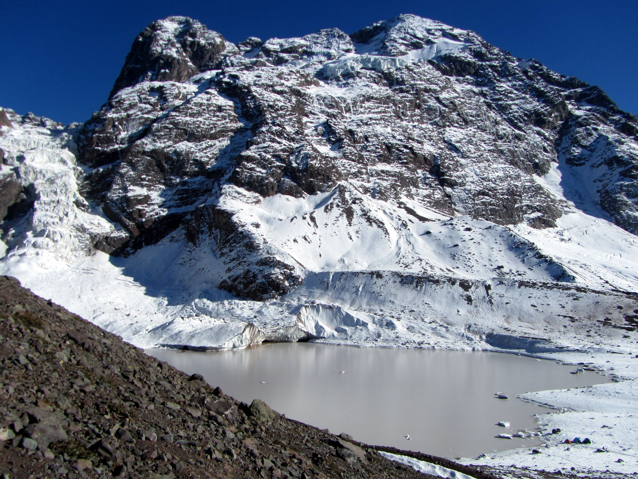 Laguna glaciar, glaciar colgante y cerro el Morado. Vista desde el cerro La Unión - Monumento natural El Morado